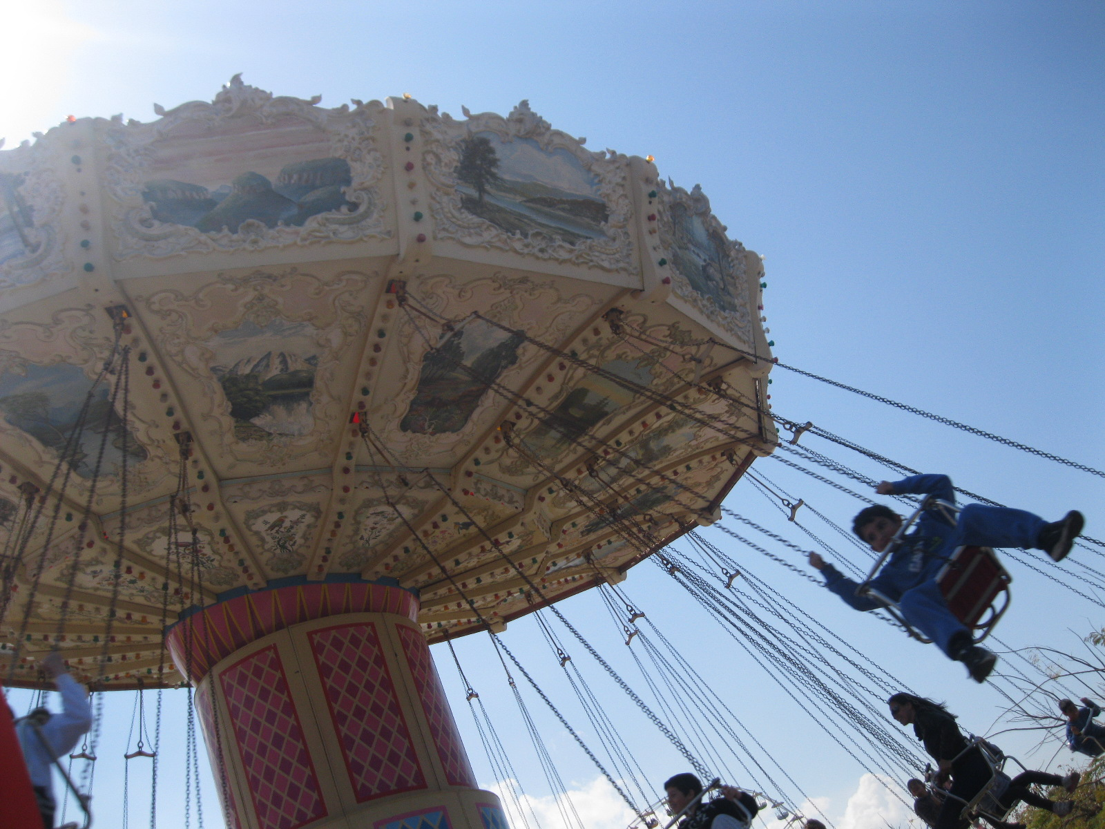 קרוסלת שרשראות בסופרלנד